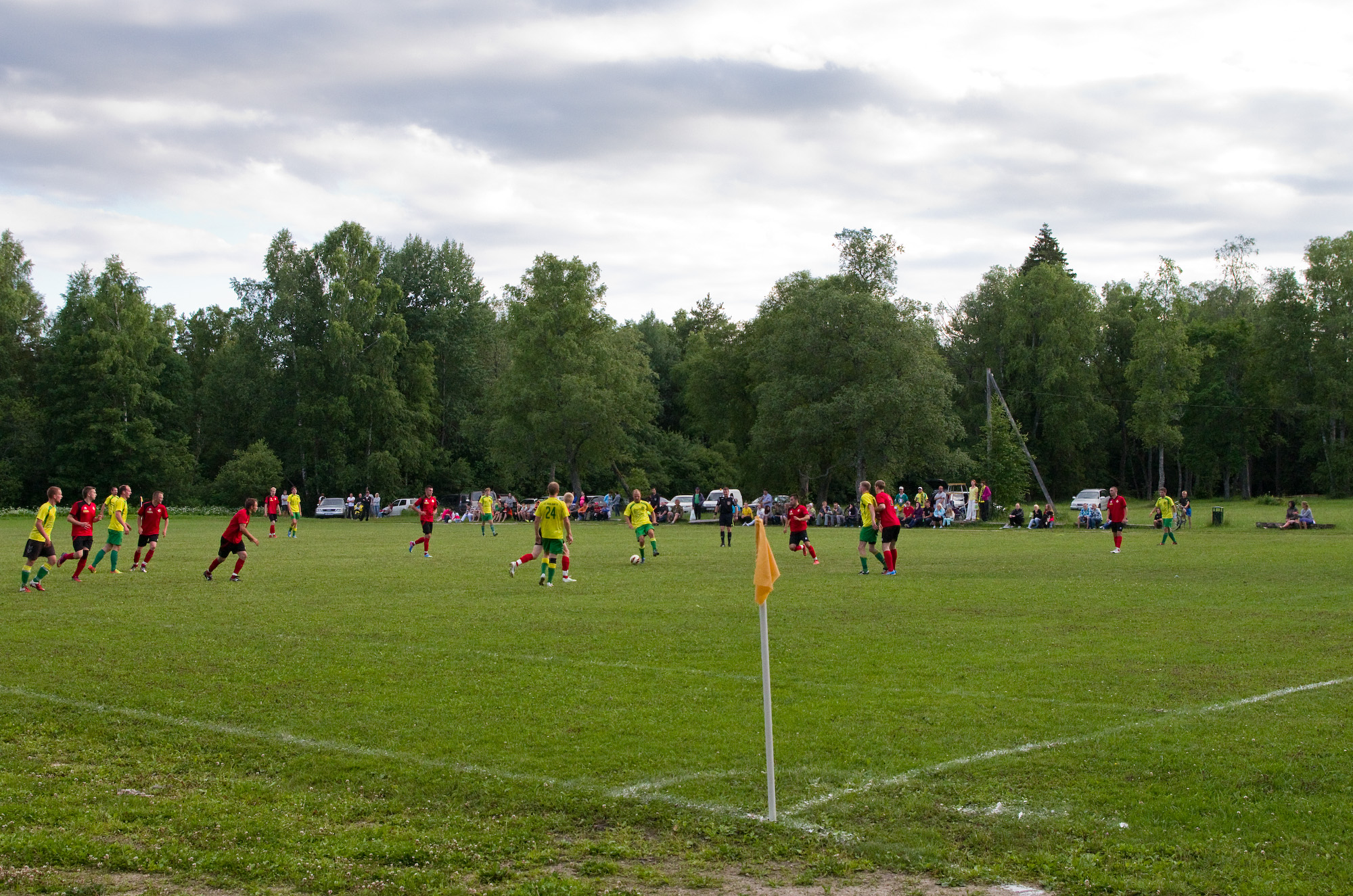 Järva-Jaani kasekopli staadion